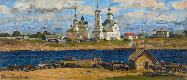 Waiting for the ferry 1914